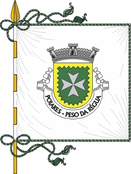 Bandeira de Poiares-Peso da Régua